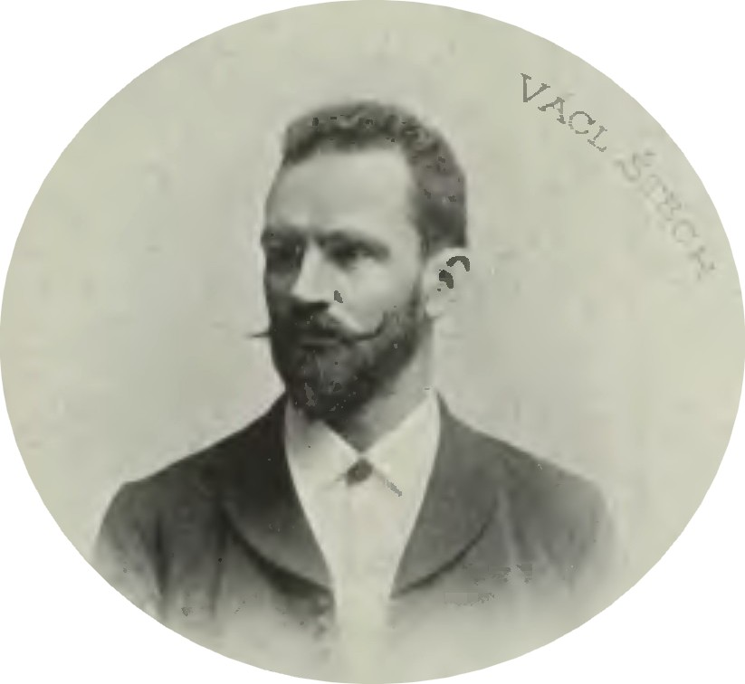 Portrét – Václav Štech (1859 - 1947), Český spisovatel, dramatik a novinář.